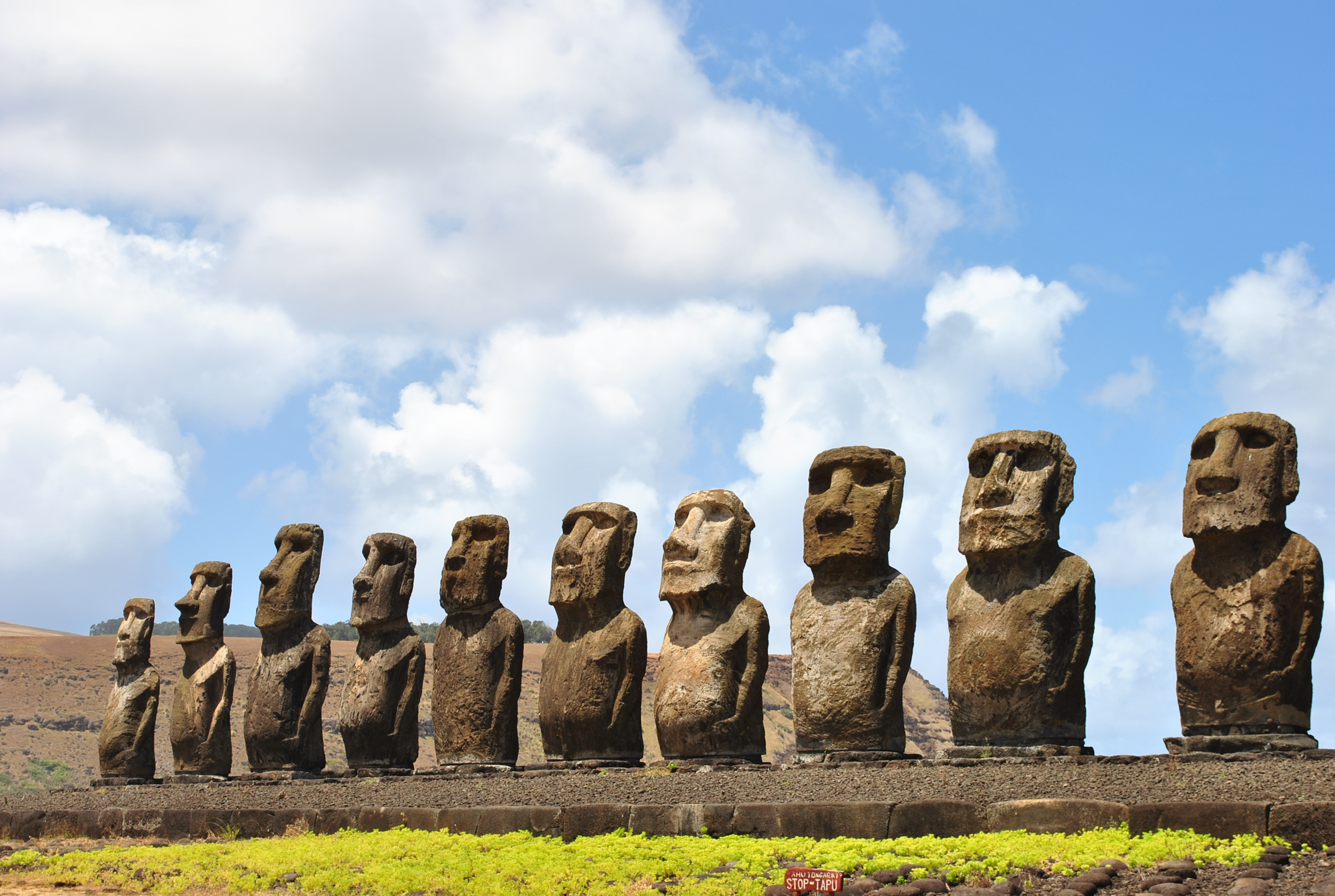 Es el Ahu mas grande de la isla ya que tiene 200 metros de largo, y contiene 15 moais sobre él. This is a photo of a national monument in Chile: 628